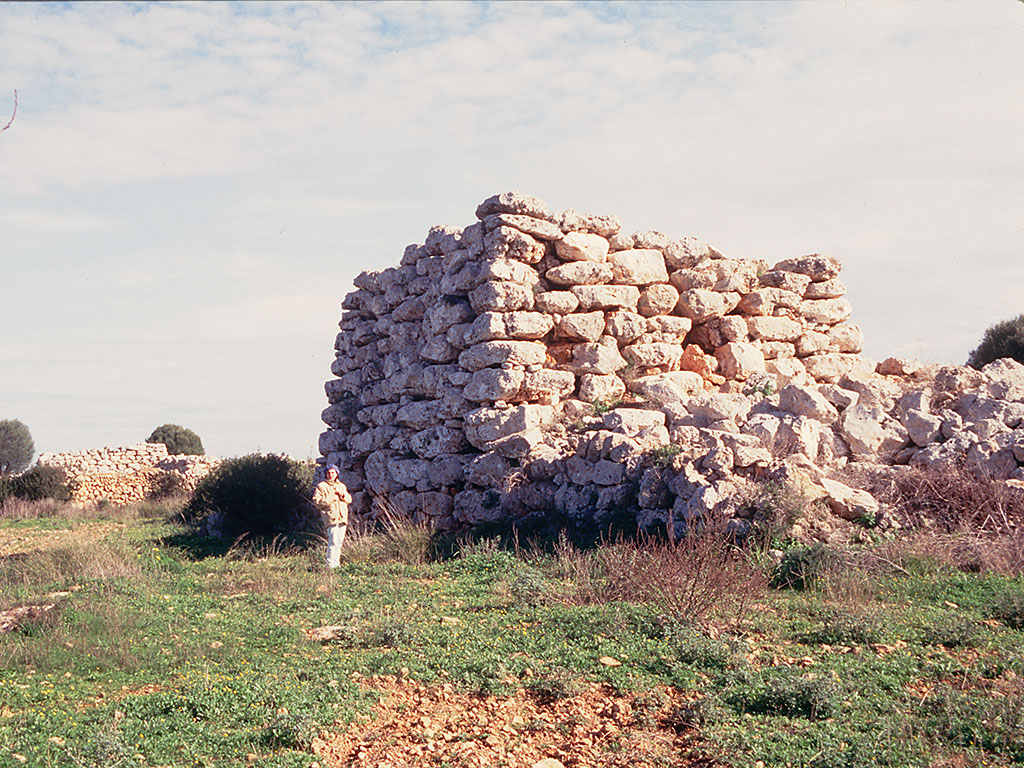 Talayot cuadrado del poblado talayótico de Capocorb Vell, Mallorca.